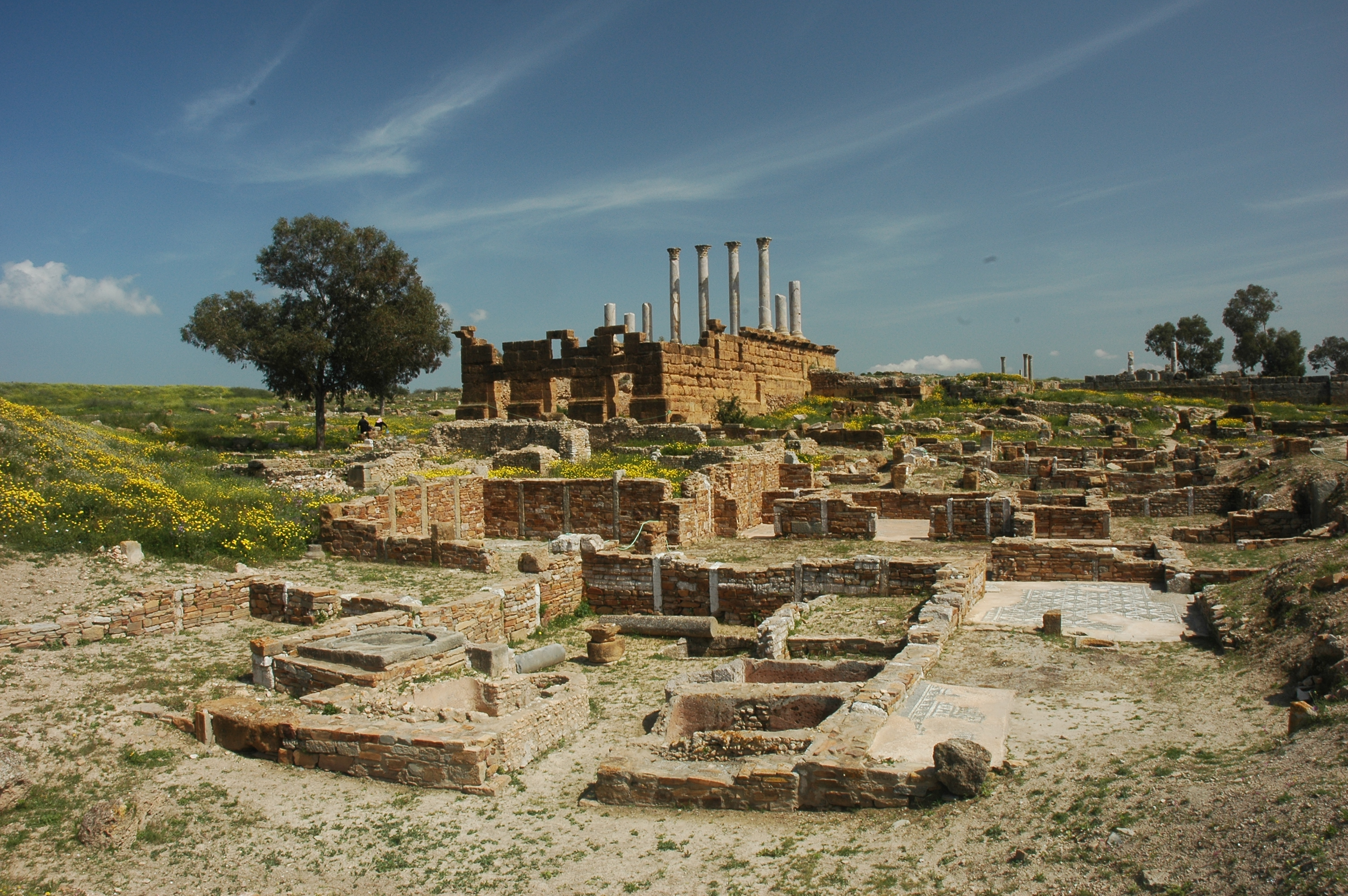 Thuburbo Majus en Tunisie